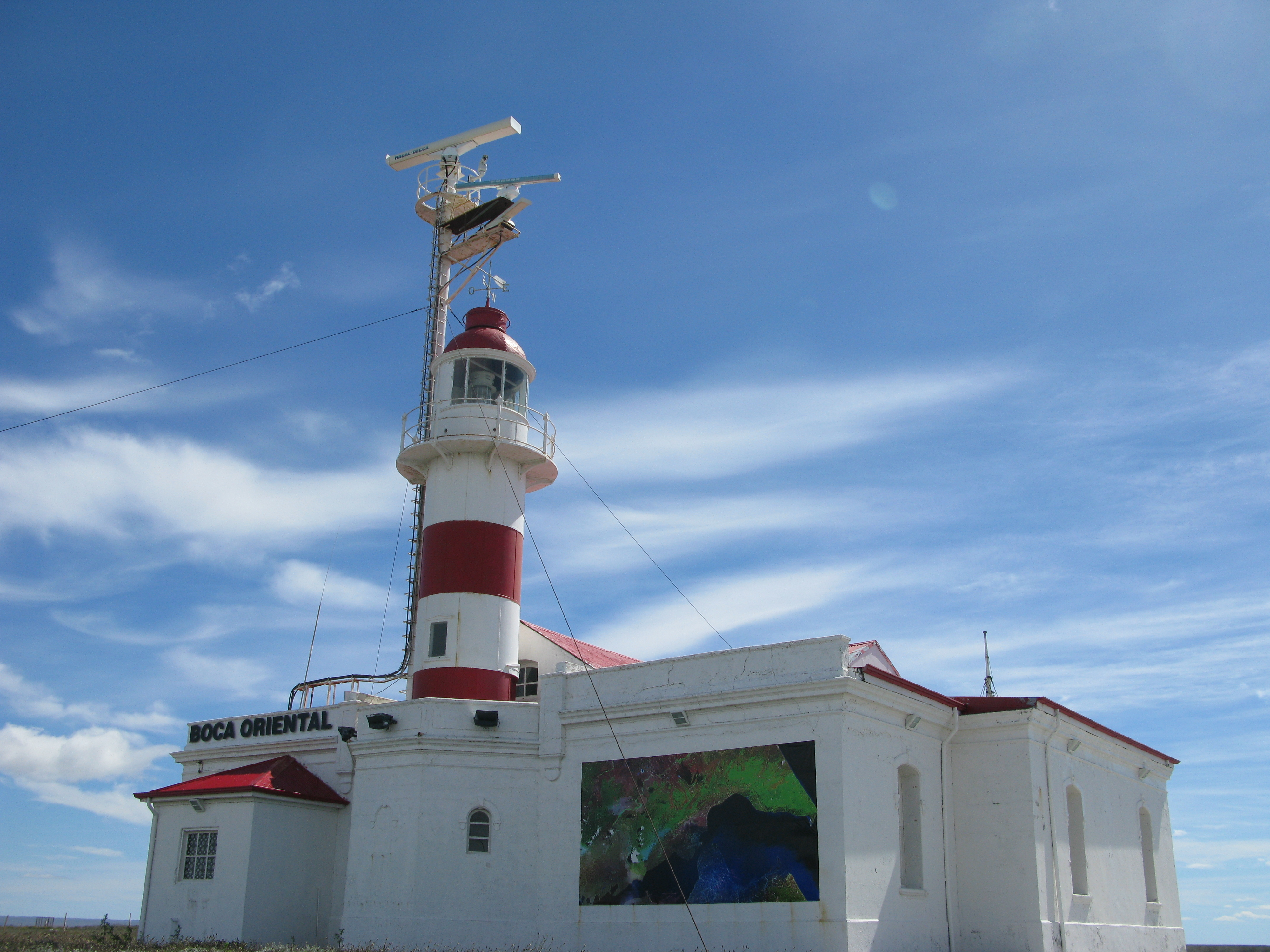 Le Phare Punta Delgada situé sur le détroit de Magellan (Chili)